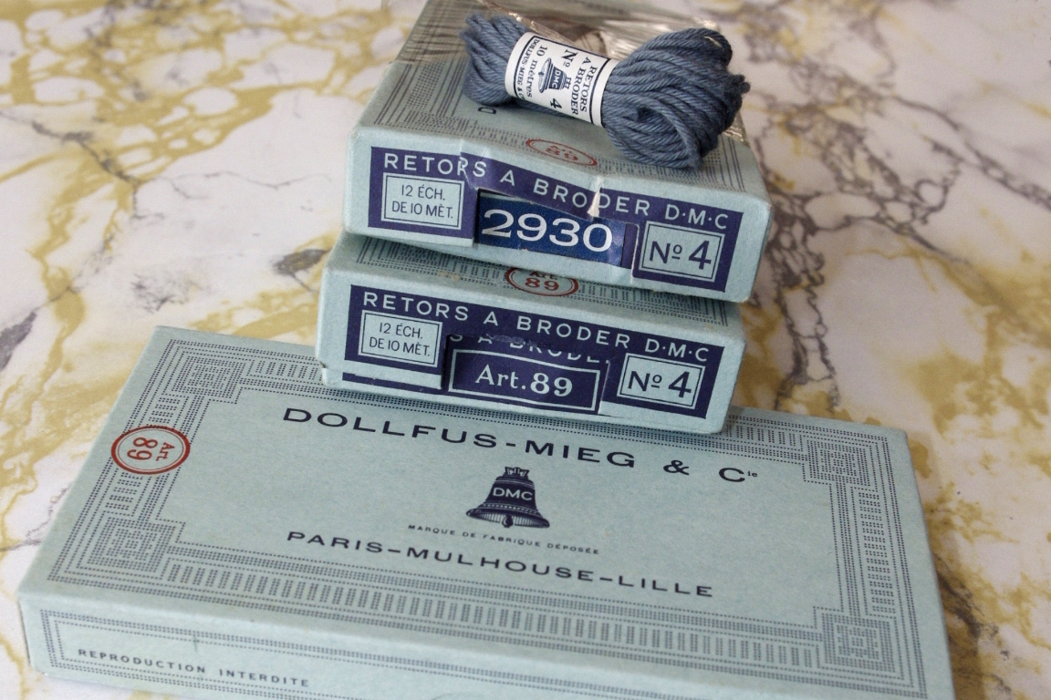 Stickgarn 1970er Jahre, Frankreich